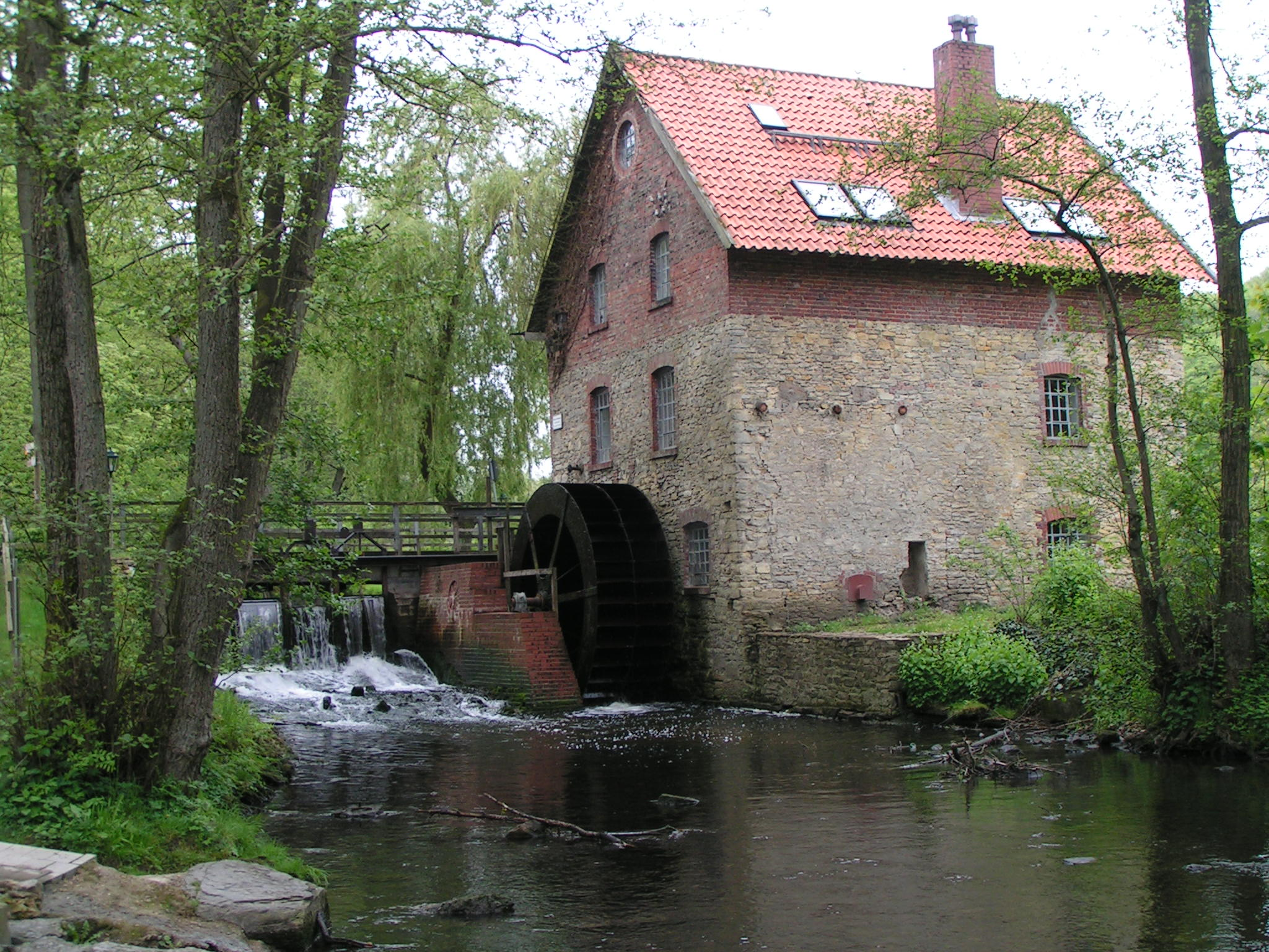 Knollmeyers Mühle an der Nette in Rulle oberhalb von Osnabrück